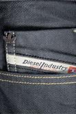 Photo jeans Diesel Adidas